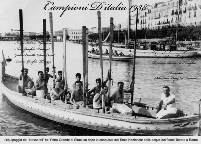 Equipaggio campione d'Italia, 1938 (Sicilia)